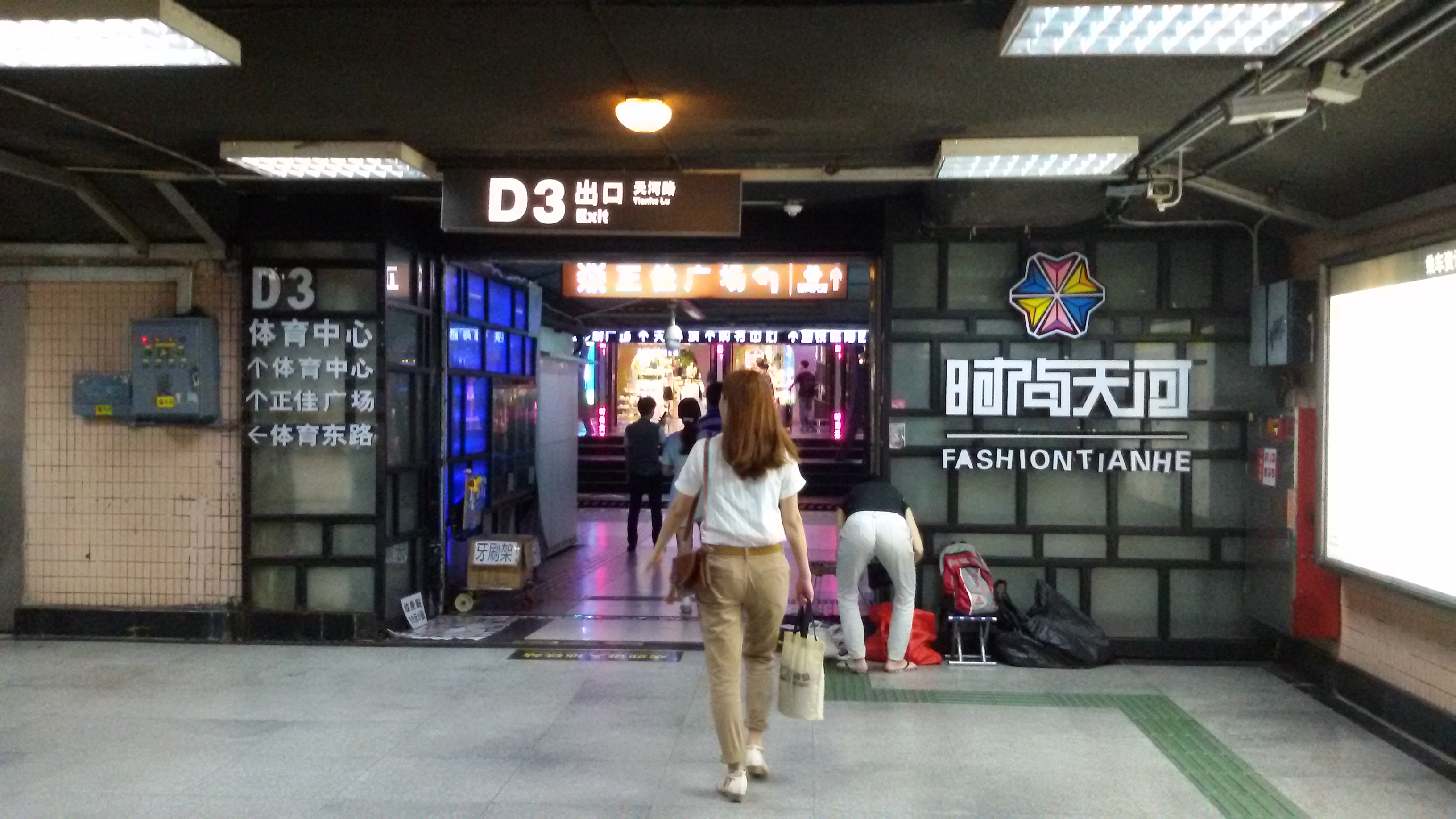 粵語: 時尚天河商業廣場東門